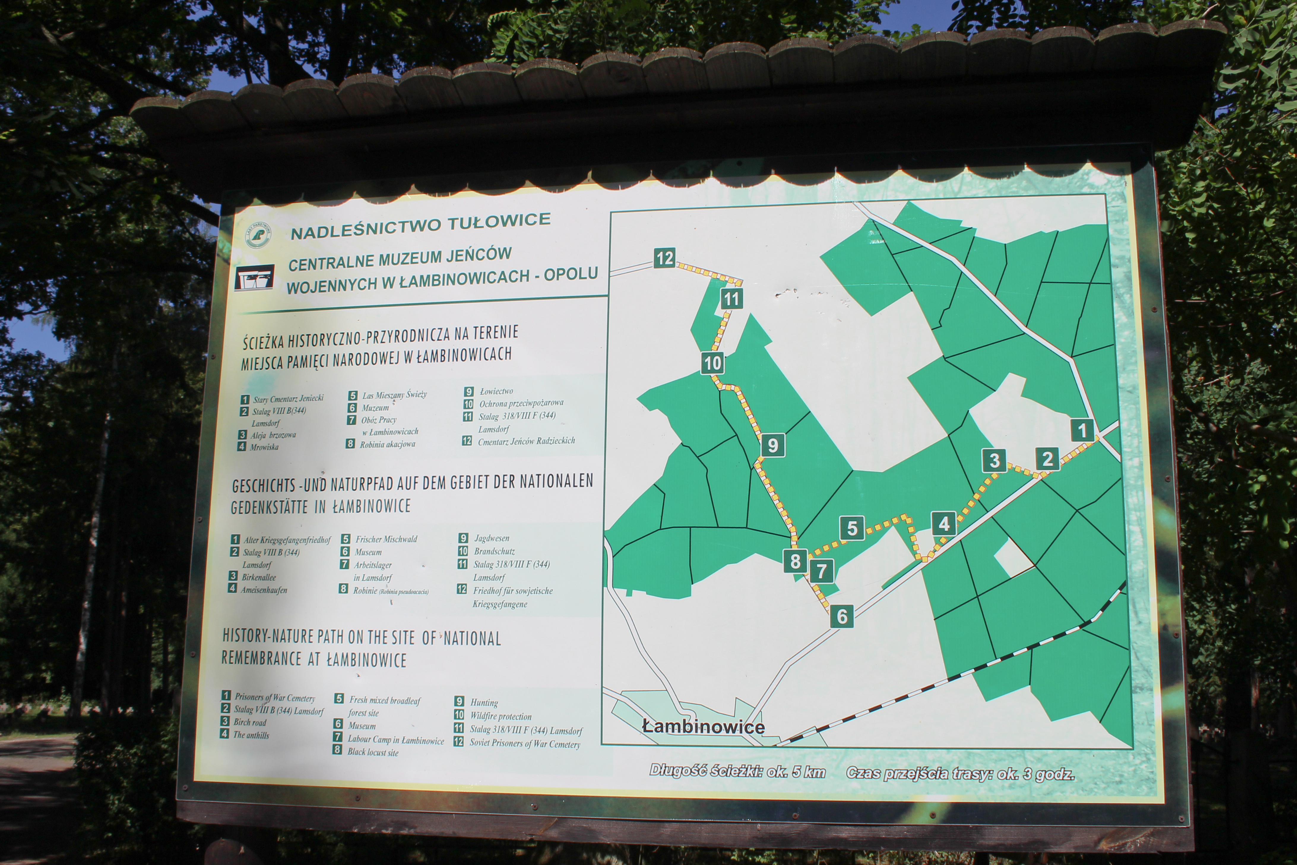 Łambinowice - wieś w Polsce w województwie opolskim, w powiecie nyskim w gminie Łambinowice, której jest siedzibą.